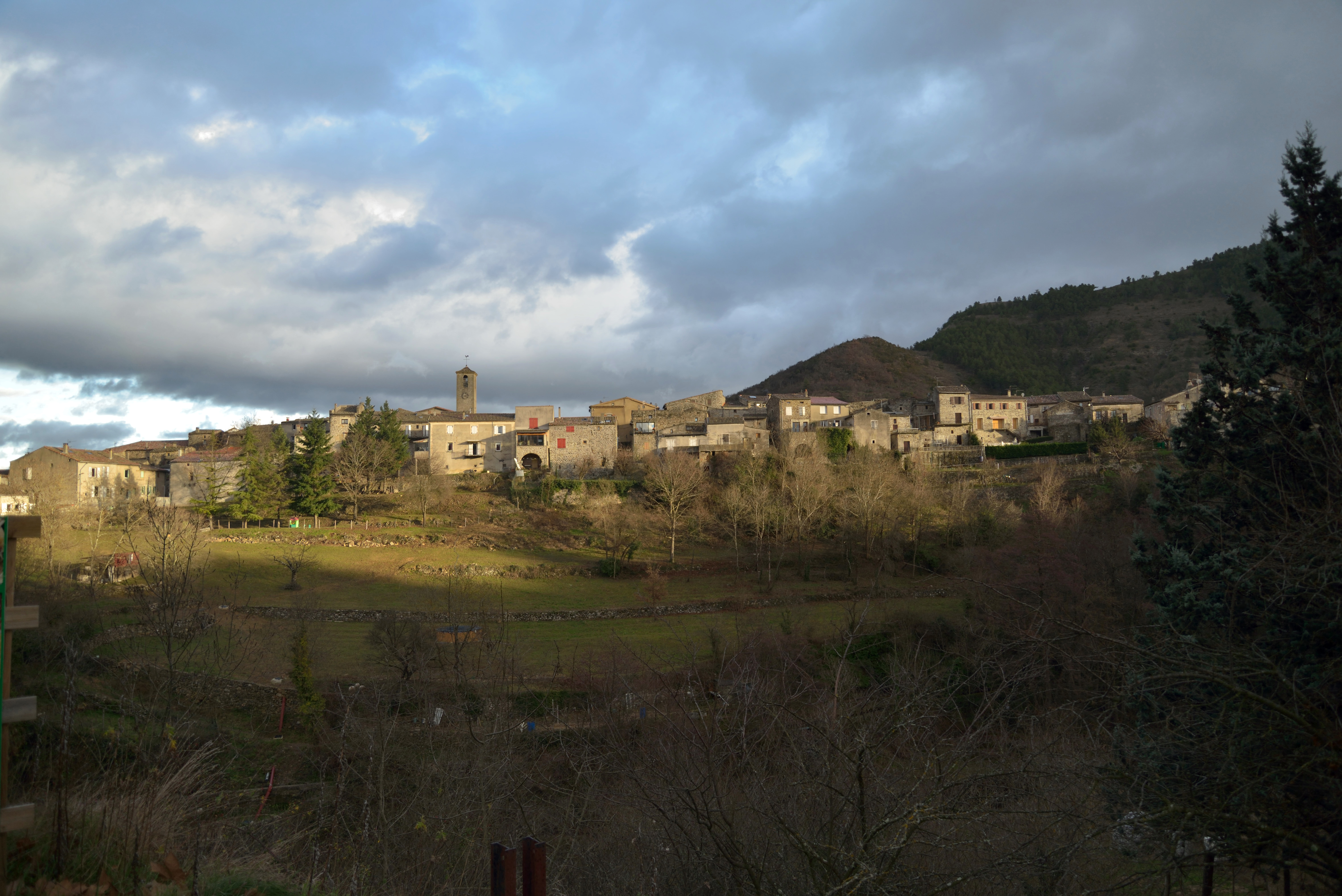 le village de Coux